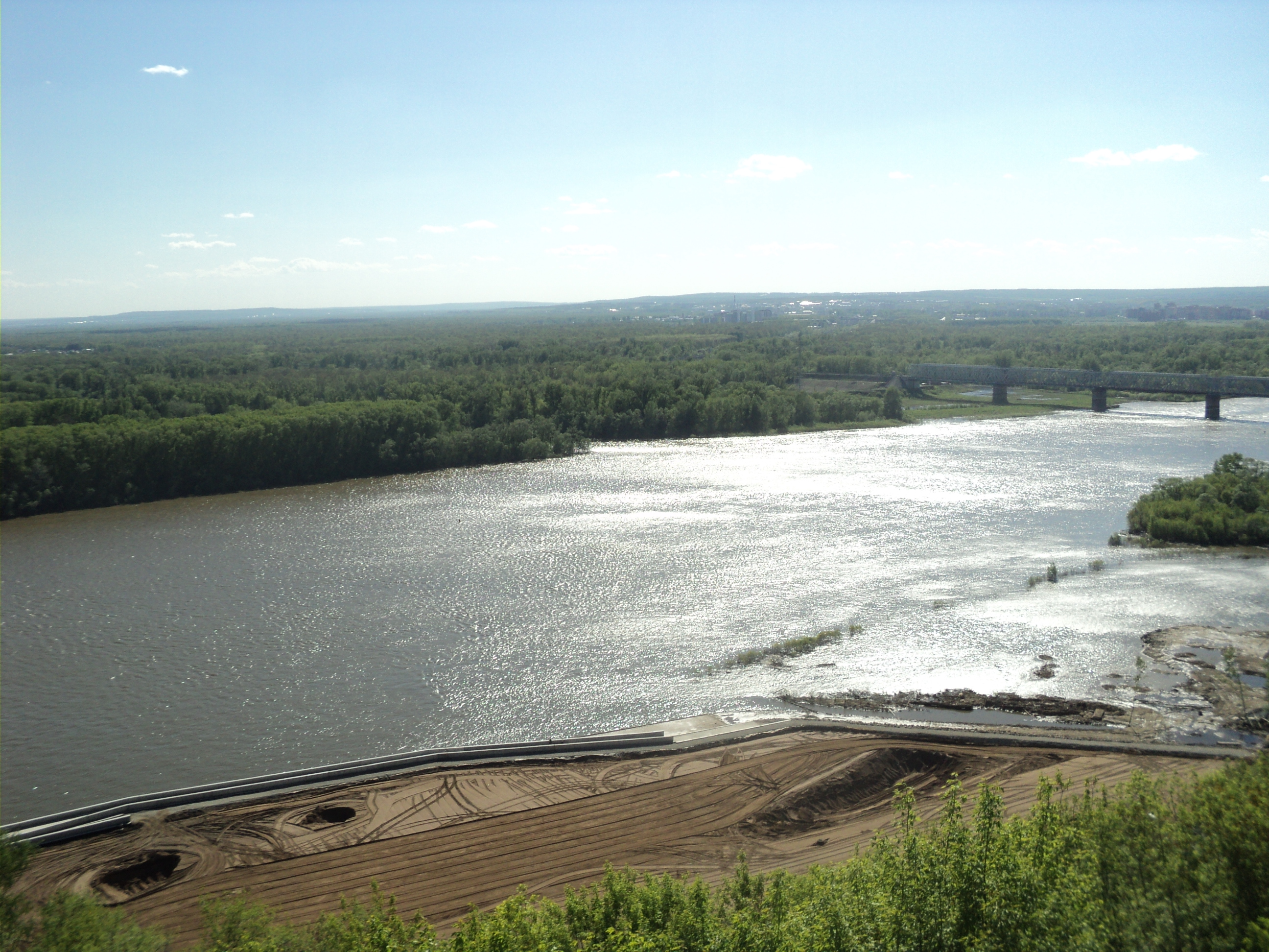 Башҡортса: Йәй уртаһы